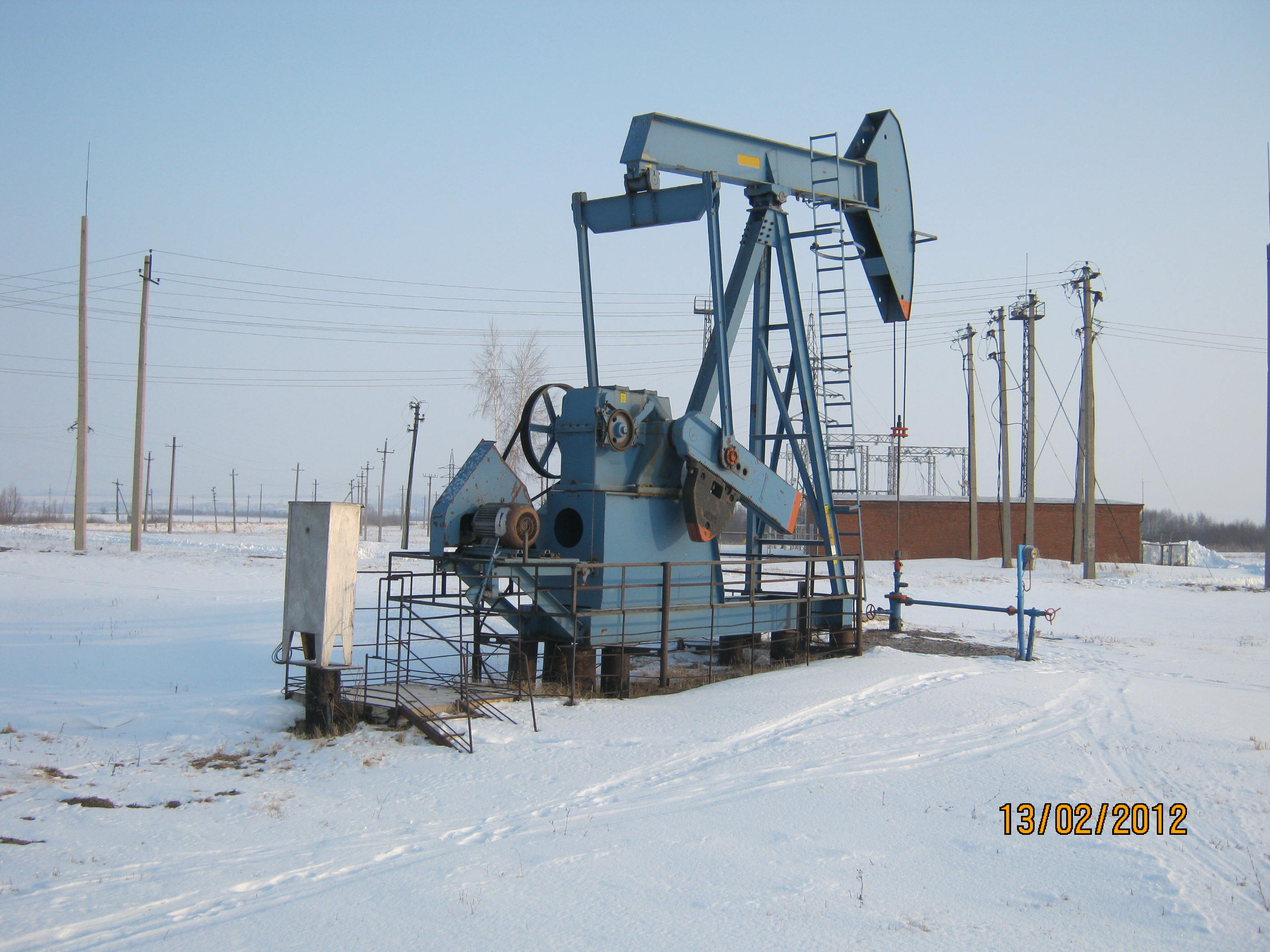 Станок-качалка "Lufkin" производства США на месторождении Башкортостана